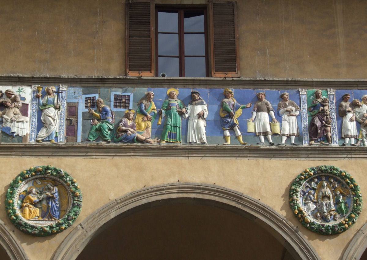 Ospedale del Ceppo, Pistoia, Italy